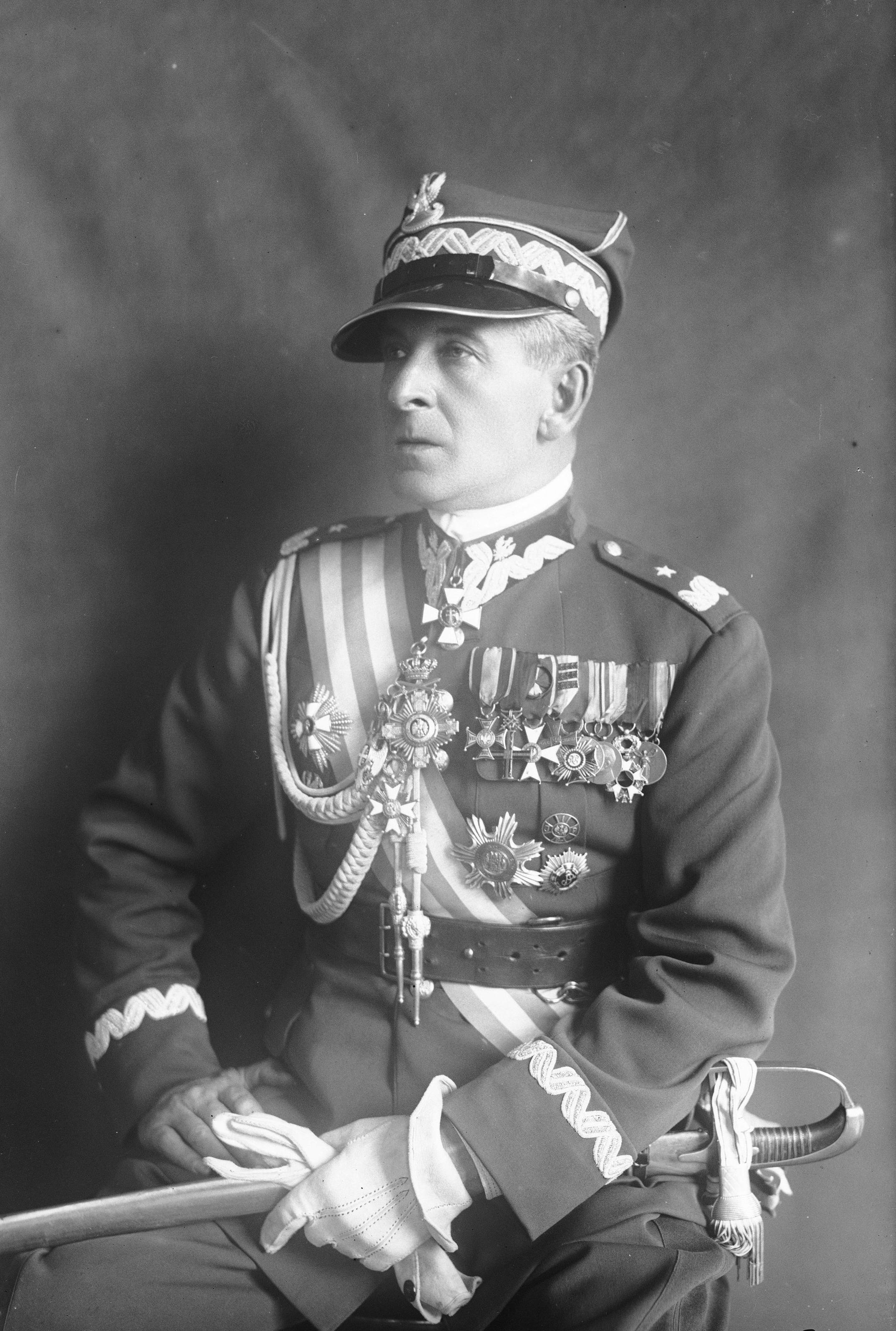 Portret siedzący (półpostać) w czapce i z szablą - w ujęciu 3/4.